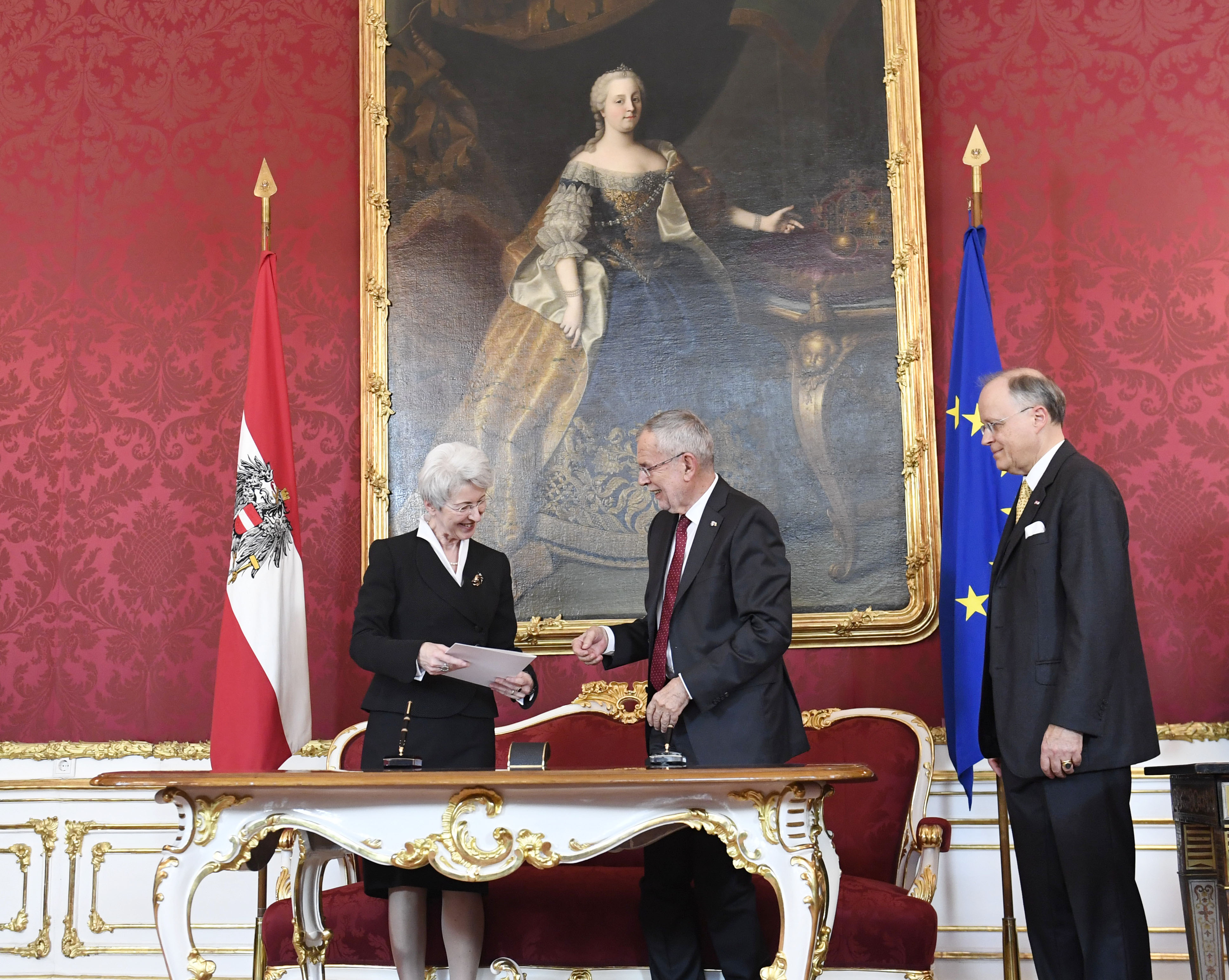 Am 3. Juni 2019 wurde Mag. Alexander Schallenberg als Bundesminister für Europa, Integration und Äußeres angelobt. Foto: Mahmoud